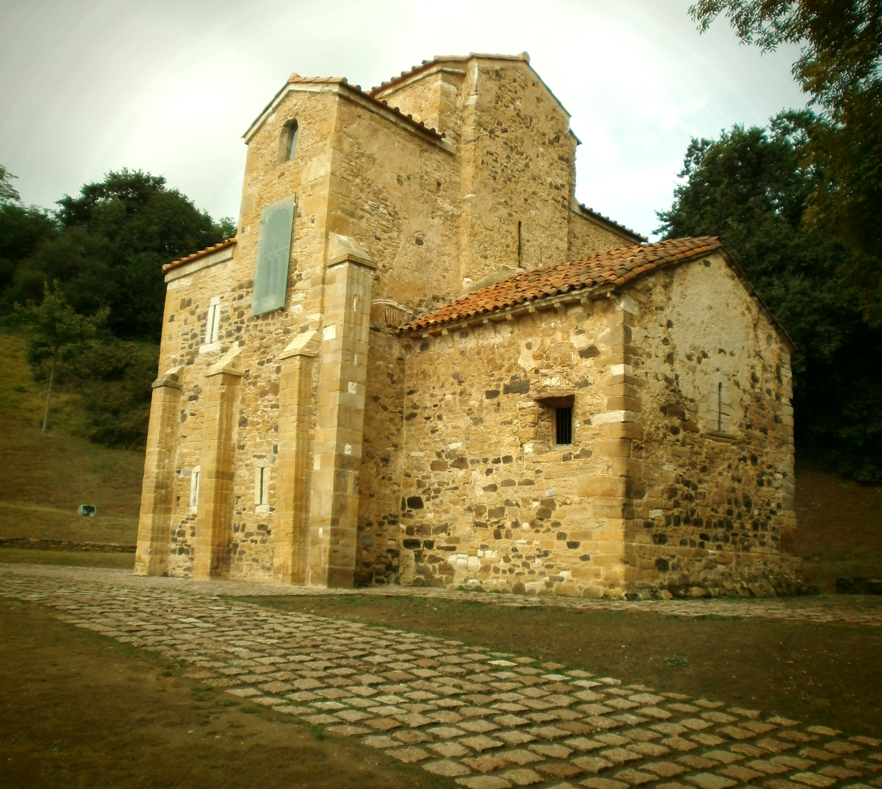 Iglesia de San Miguel de Lillo